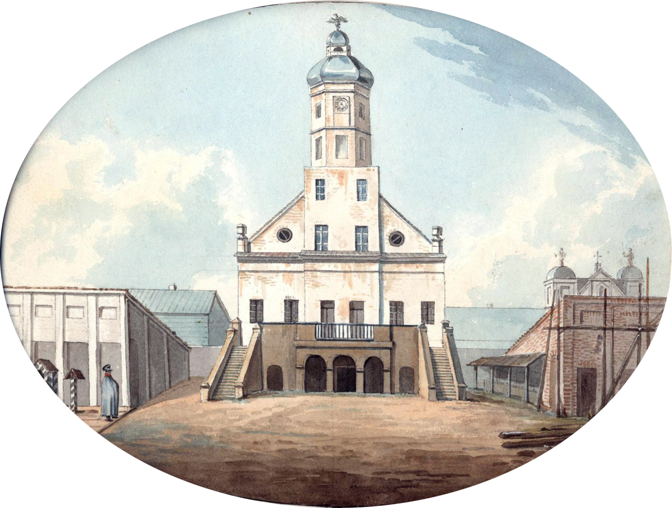 Беларуская (тарашкевіца): Нясьвіж (Niaśviž), пляц Рынак (plac Rynak). Ратуша